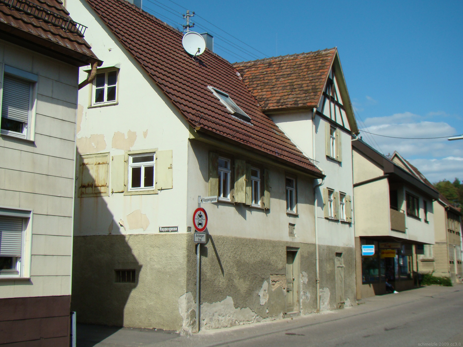 Wohnhaus Finkenbergstr.5 in Heilbronn-Biberach mit denkmalgeschütztem, über der Tür vermauertem Ofenstein